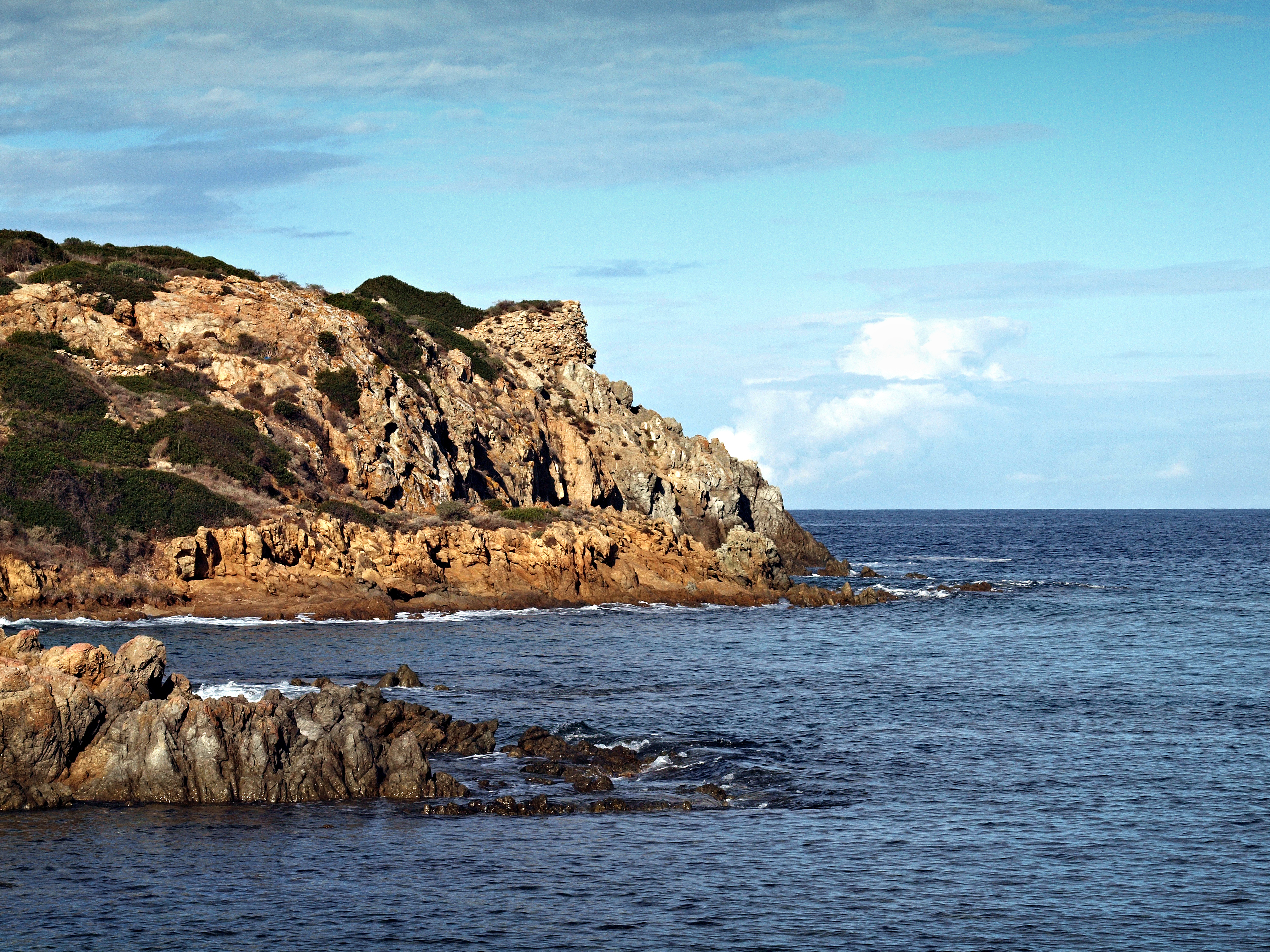 Monticello, Balagne (Corse) - Tour ruinée de Saleccia